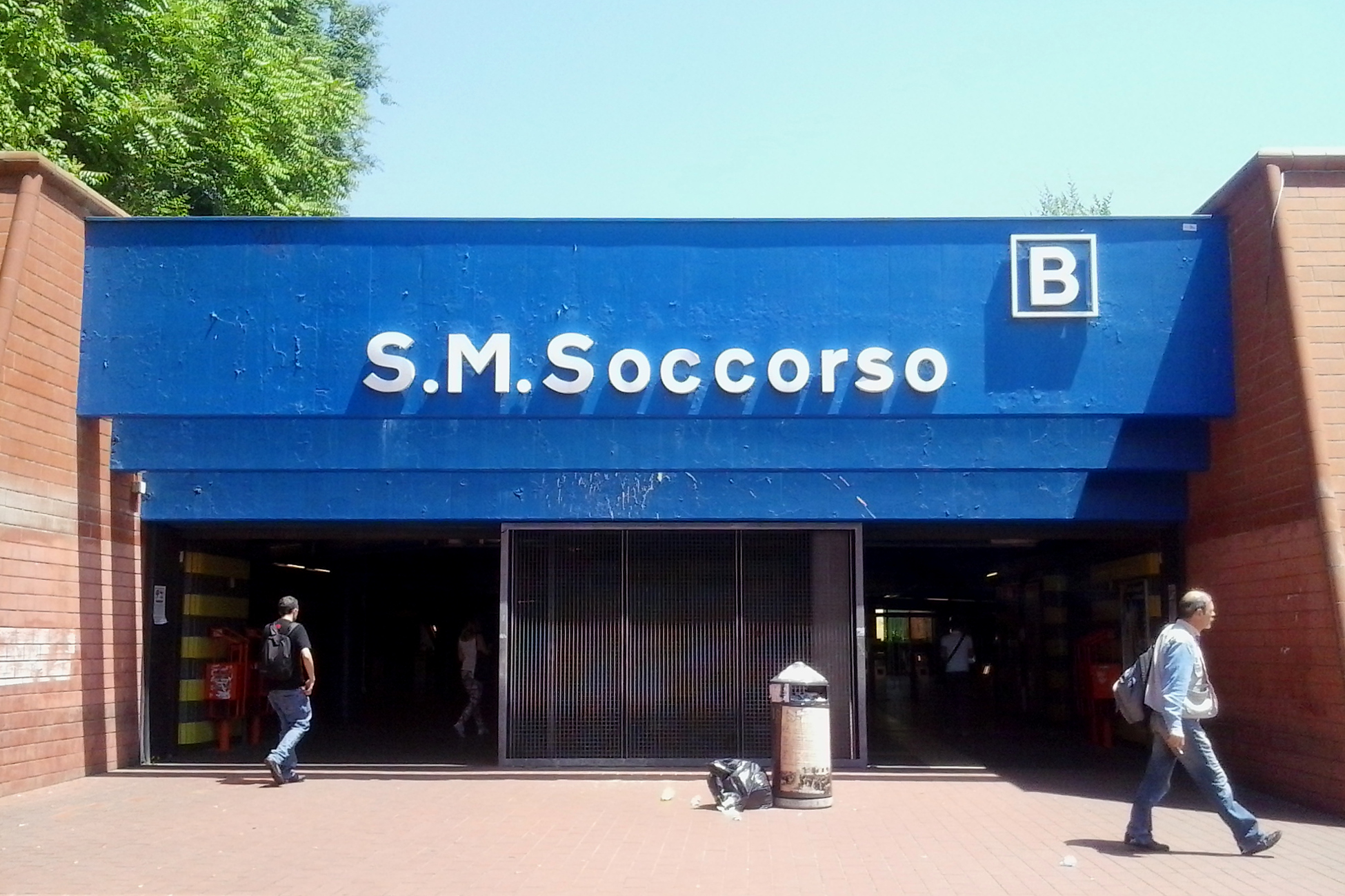 Entrance of Rome Metro B station Santa Maria del Soccorso